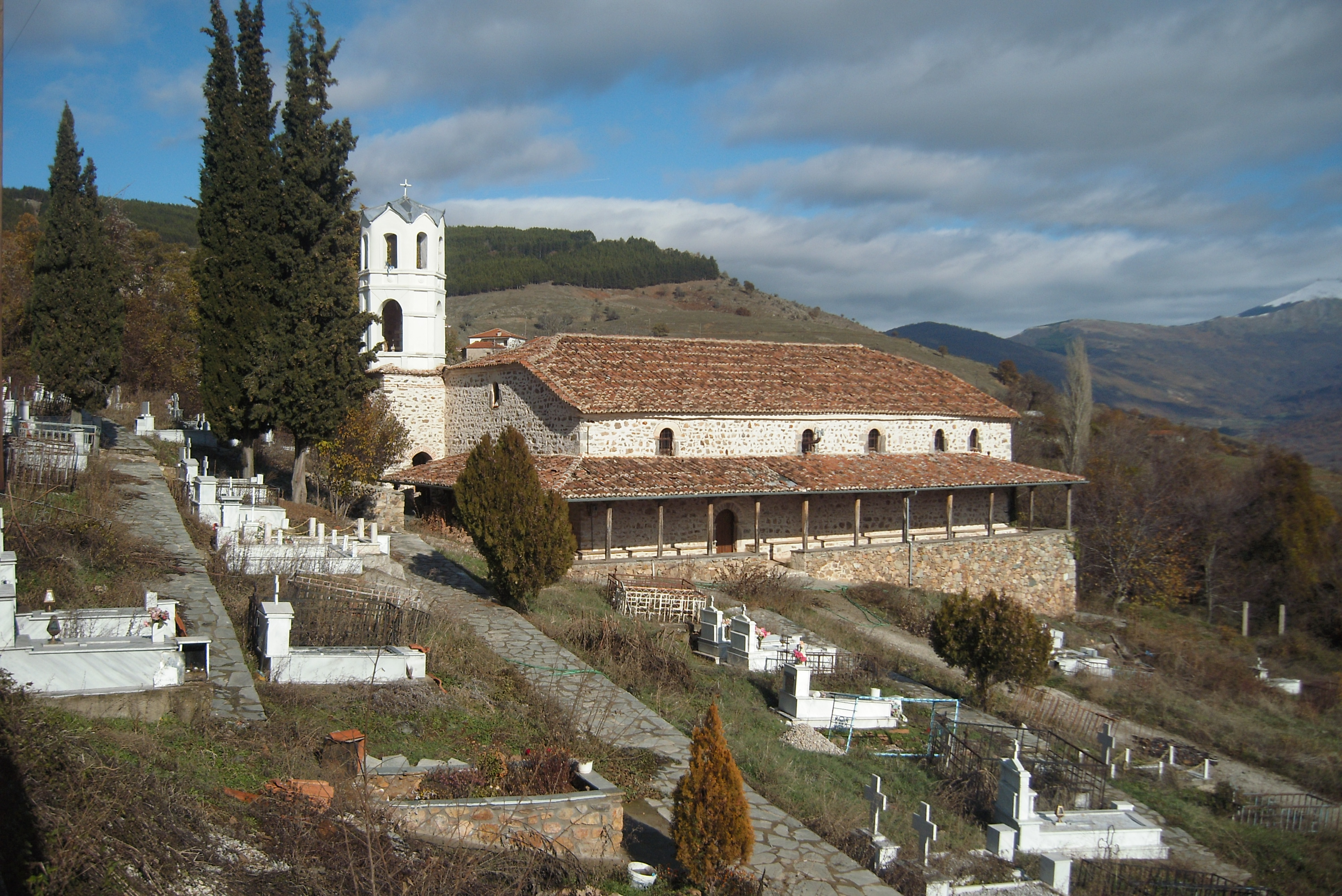 Гробищната църква в Шестеово